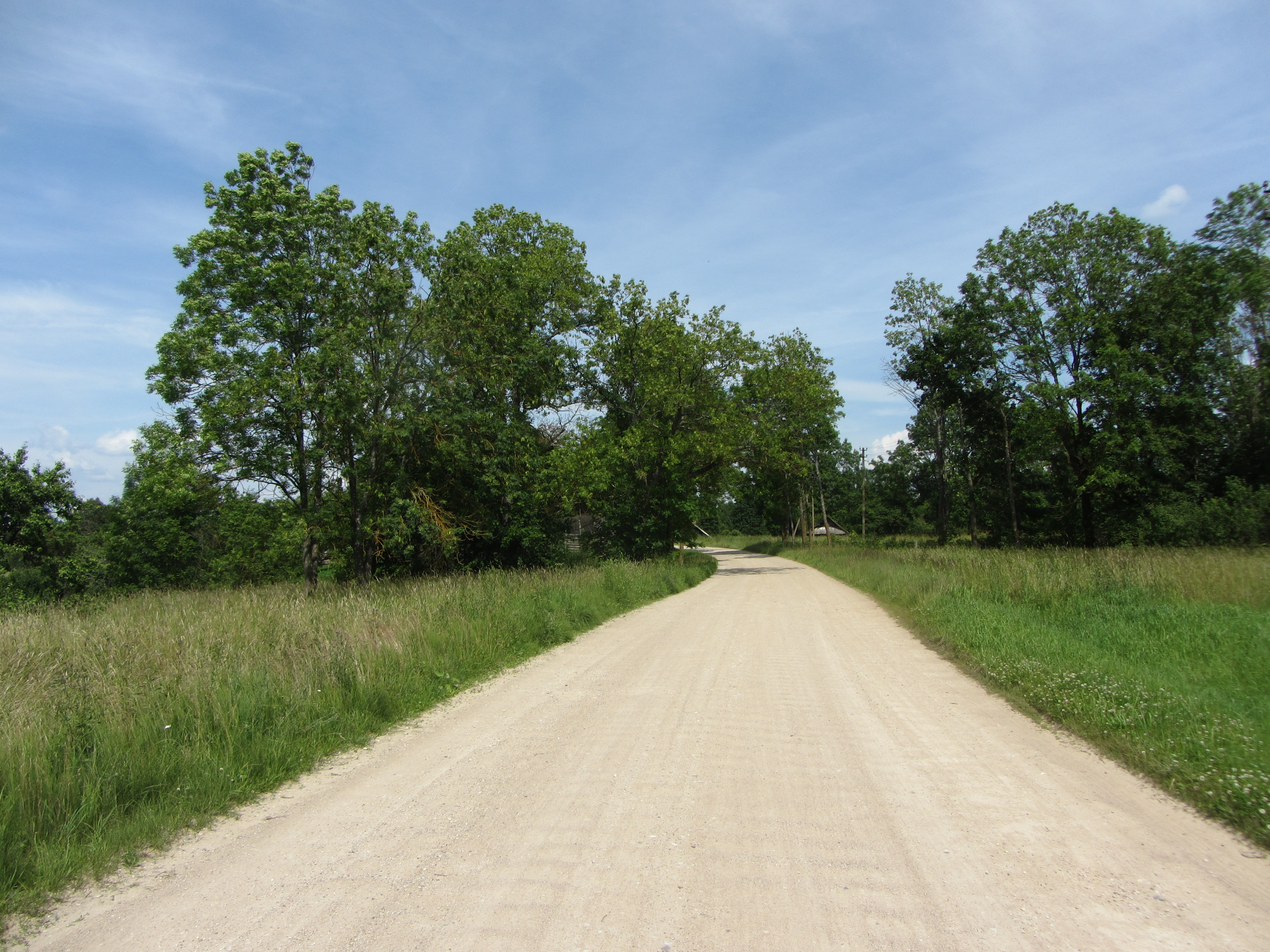 Berniūnai, Lithuania